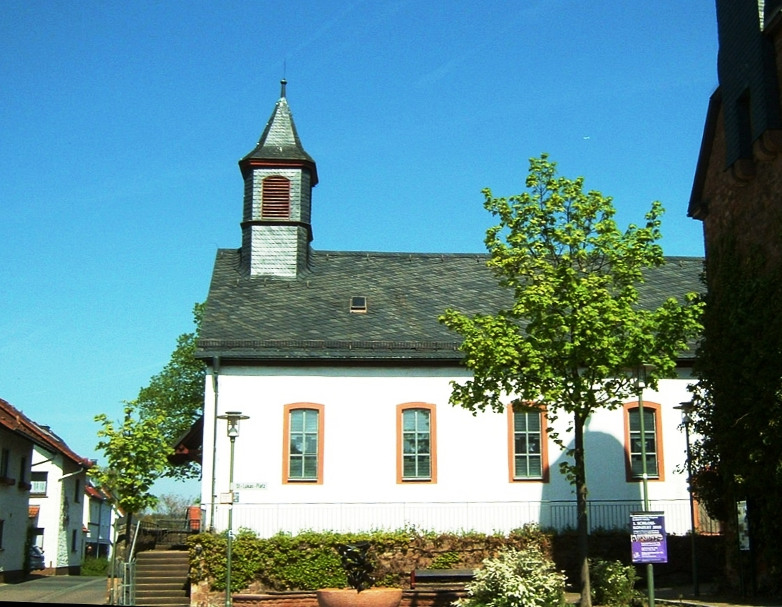 evangelische Lukaskirche in Leider, einem Stadtteil von Aschaffenburg